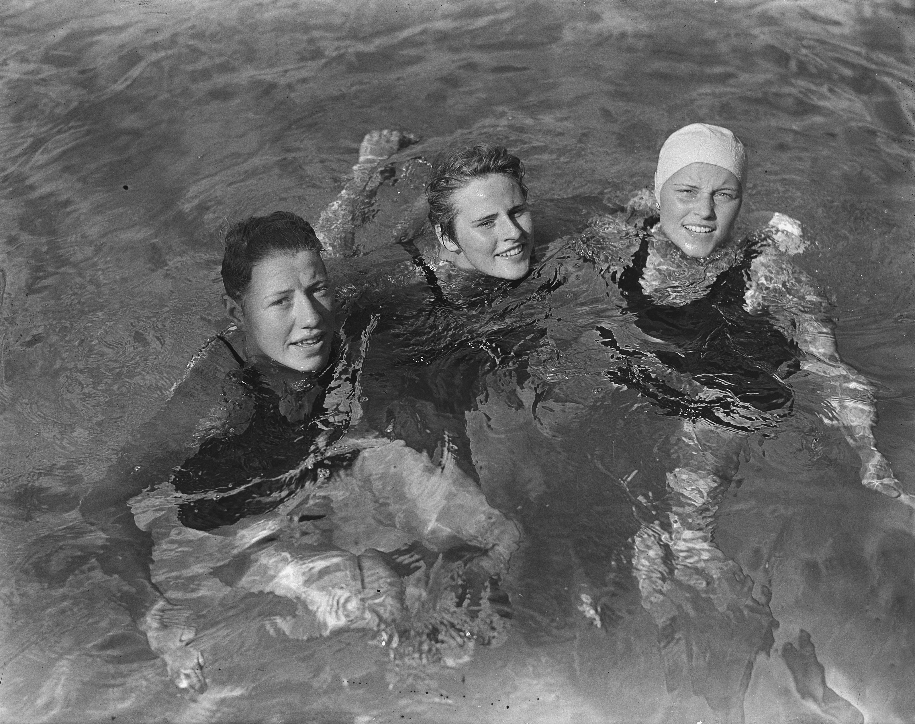 Collectie / Archief : Fotocollectie Anefo Reportage / Serie : [ onbekend ] Beschrijving : Nederlandse zwemkampioenschappen Nijmegen, Geertje Wielema Datum : 16 augustus 1953 Locatie : Nijmegen Trefwoorden : zwemkampioenschappen Persoonsnaam : Geertje Wielema Fotograaf : Noske, J.D. / Anefo Auteursrechthebbende : Nationaal Archief Materiaalsoort : Glasnegatief Nummer archiefinventaris : bekijk toegang 2.24.01.09 Bestanddeelnummer : 905-8864